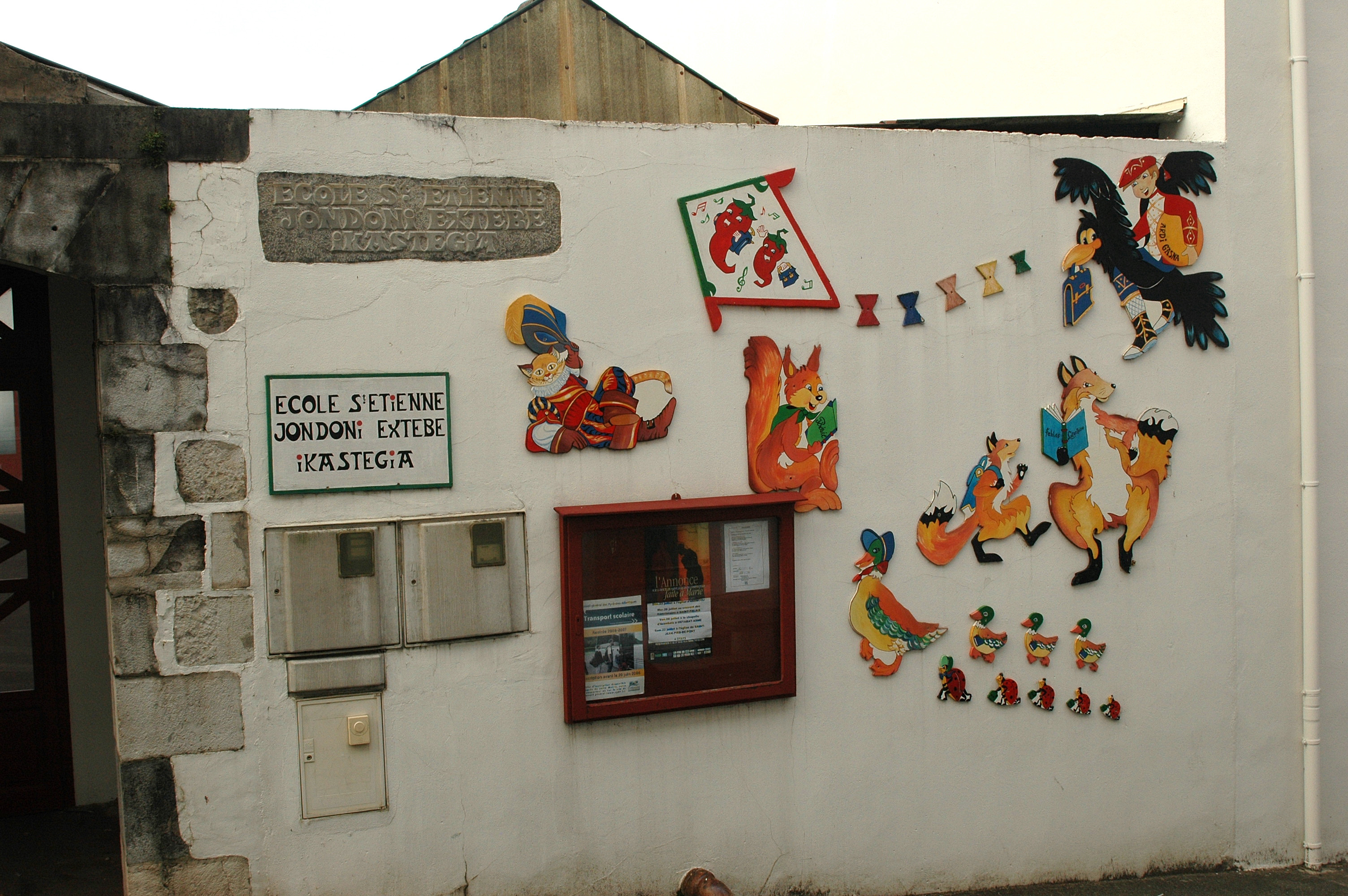 Espelette, école Saint-Etienne. Photo prise le 08/08/06 par Harrieta171